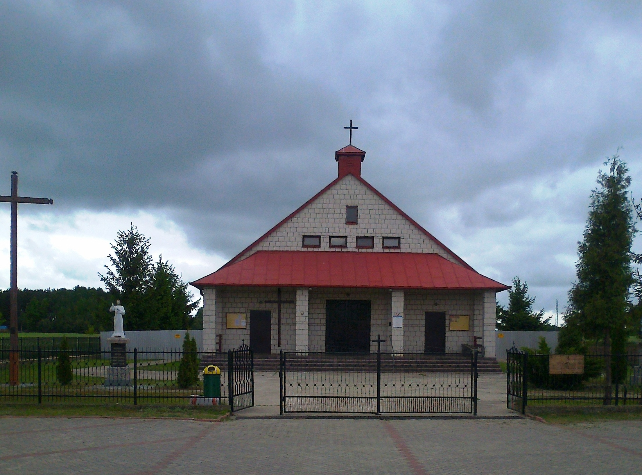 kościół bł. ks. Jerzego Popiełuszki w Nunie (gm. Nasielsk, pow. Nowy Dwór Mazowiecki, woj. Mazowieckie)